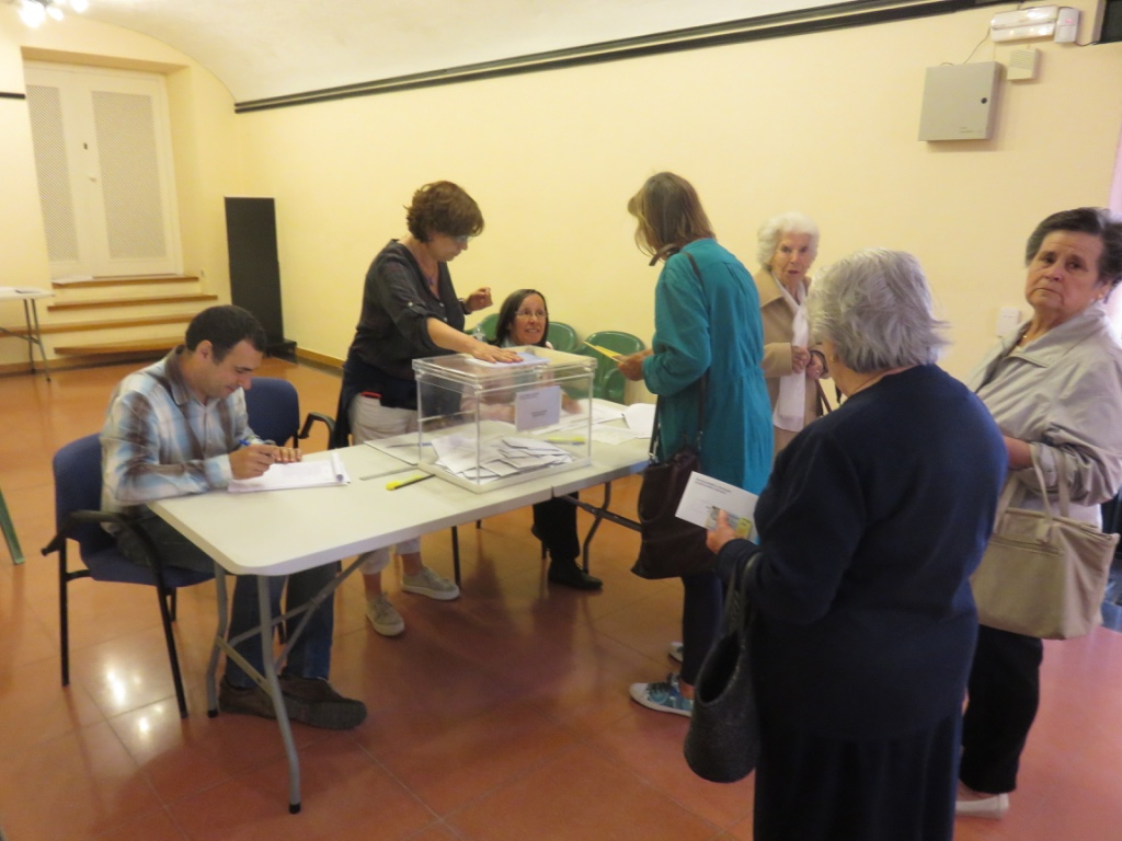 Eleccions municipals a Begur de 2015